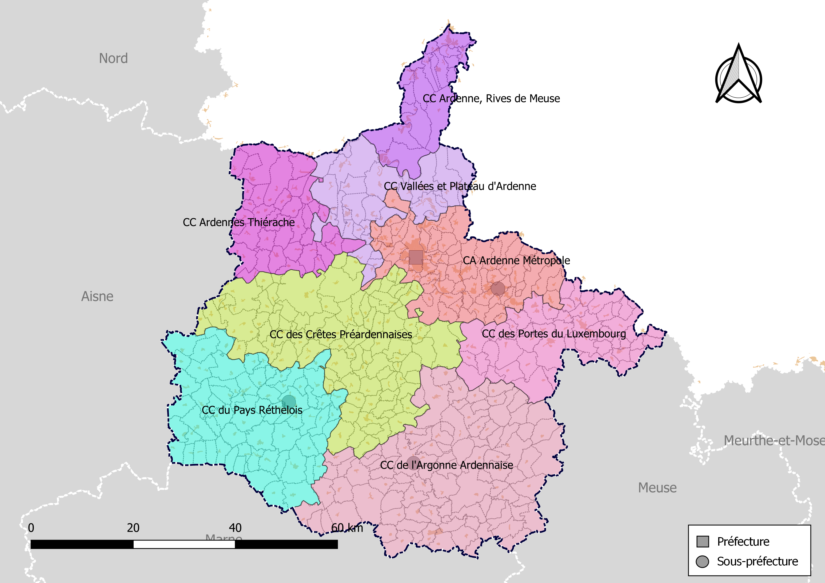 Carte des intercommunalités du département des Ardennes, France. Composition au 1er janvier 2019